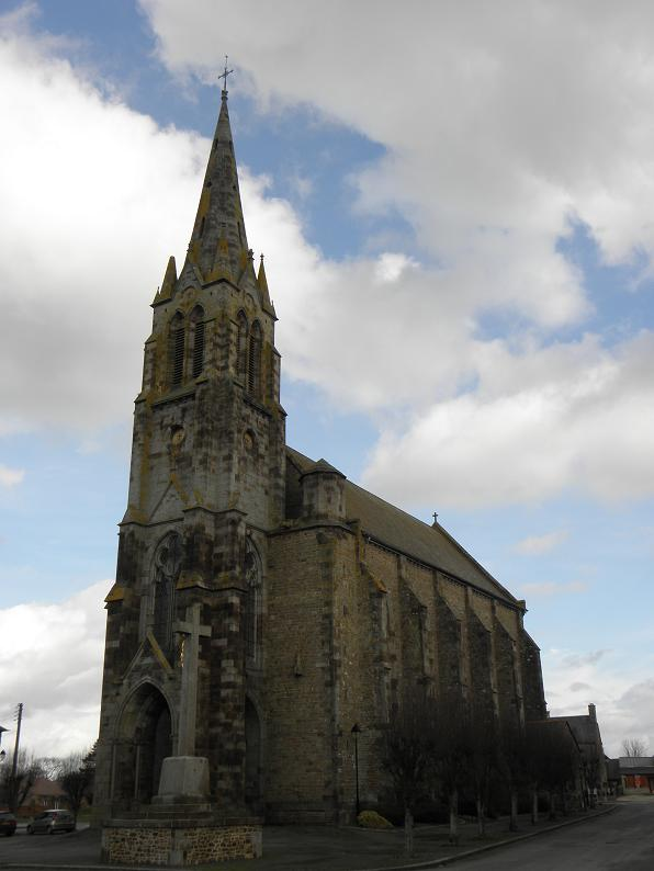 Église Saint-Pierre de Sains (35).